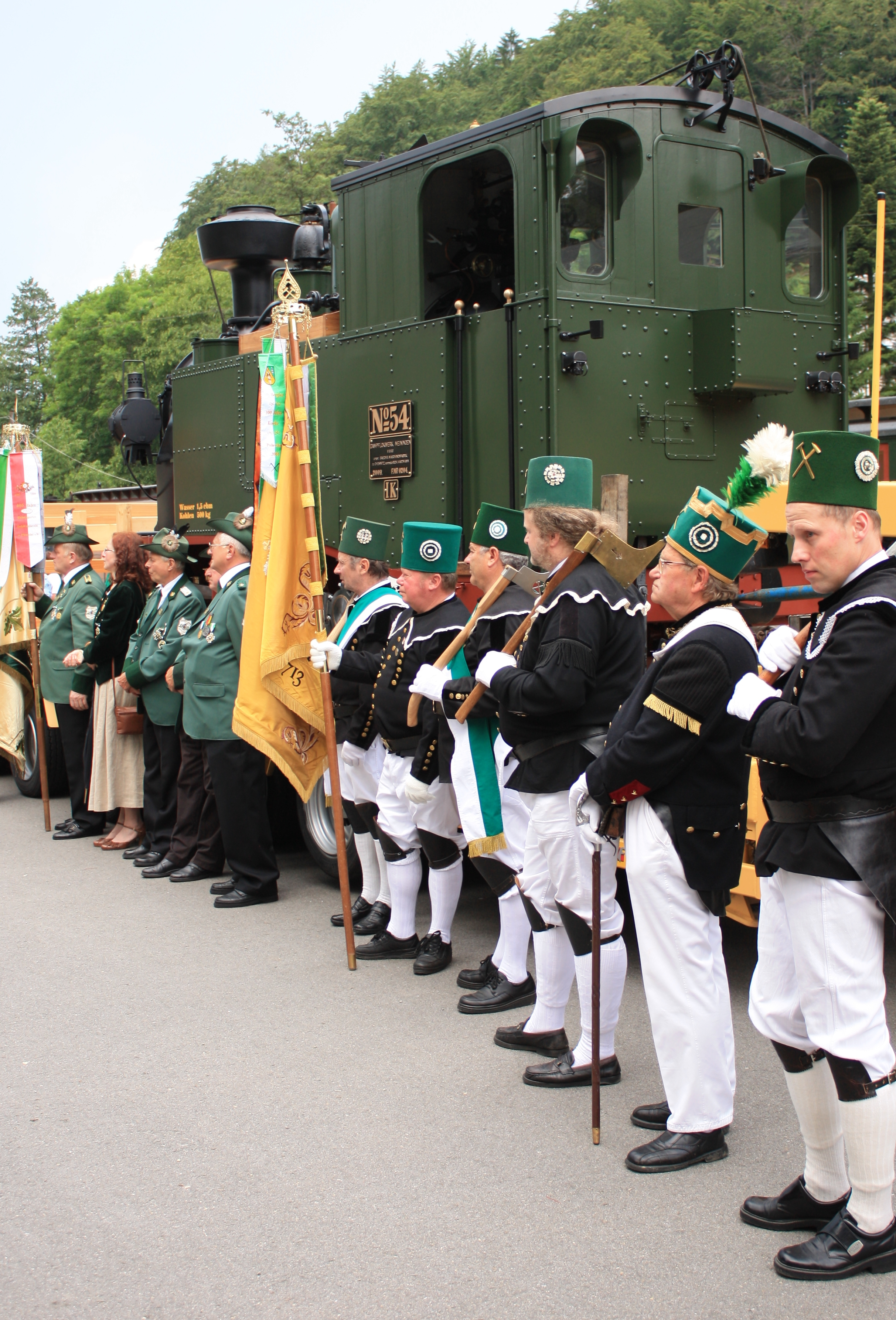 Mitglieder von Knappschaft und Schützenverein Rittersgrün bei der "I K-Willkommenstour" auf dem Rittersgrüner Museumsbahnhof am 1. Juli 2009.